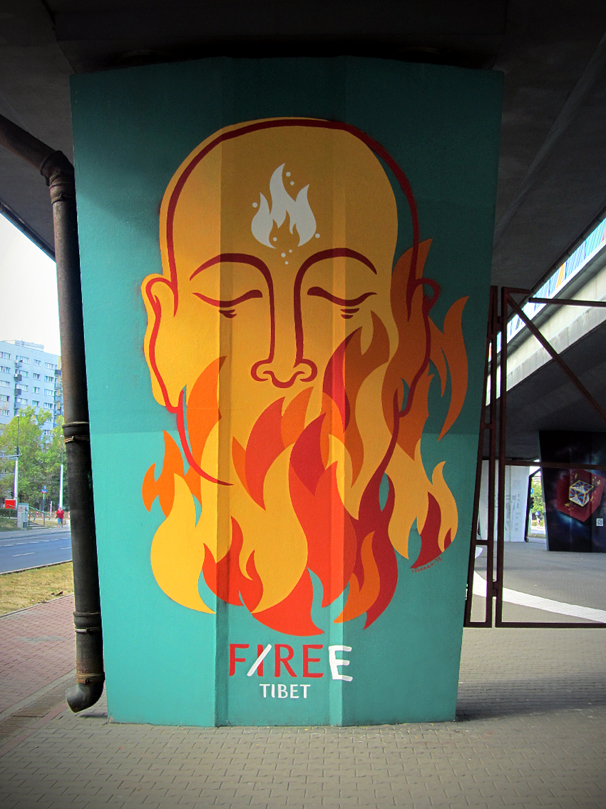 Mural Małgorzaty Rozenau w Galerii Tybetańskiej w Warszawie